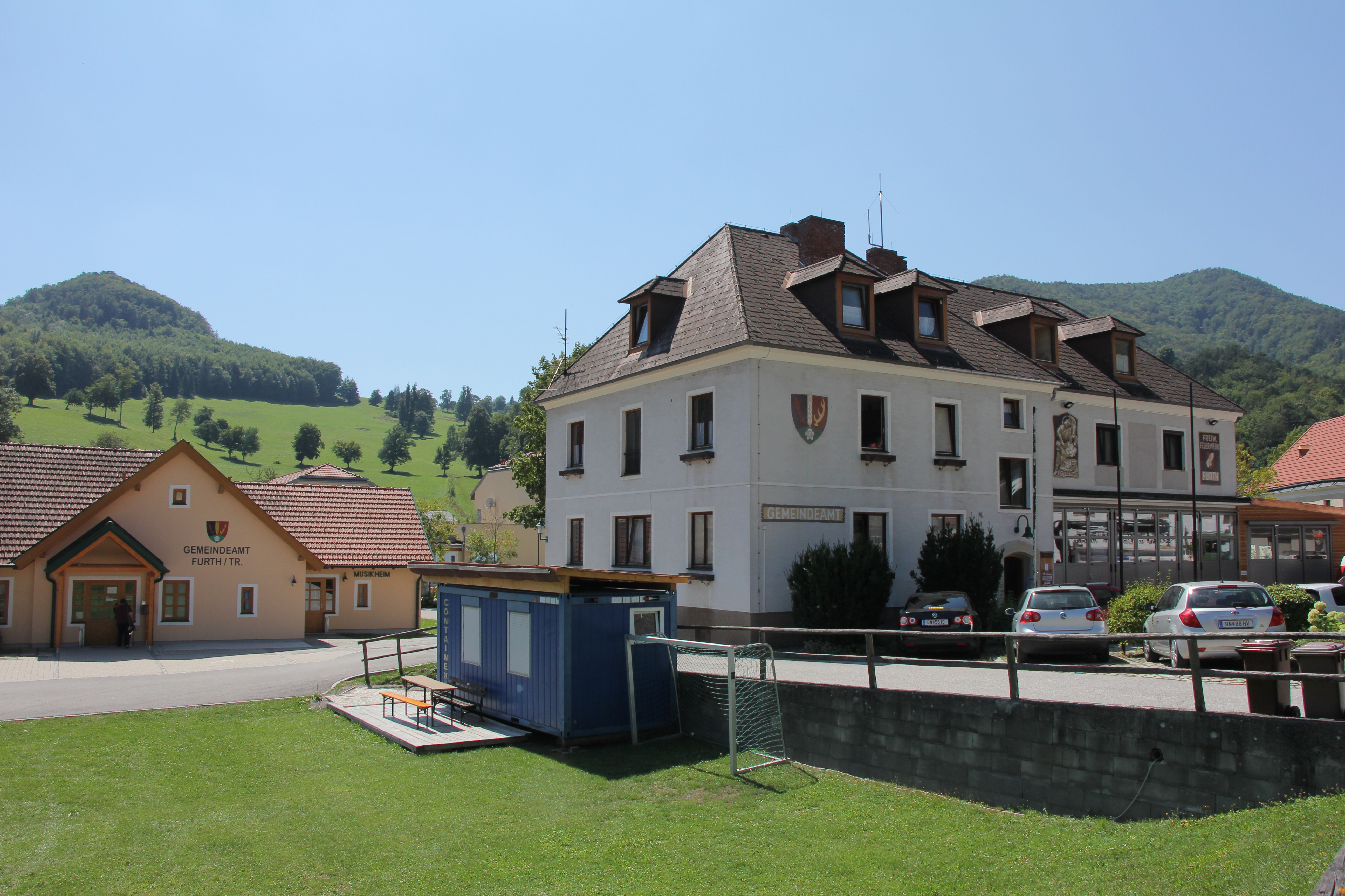 Gemeindeamt in Furth an der Triesting